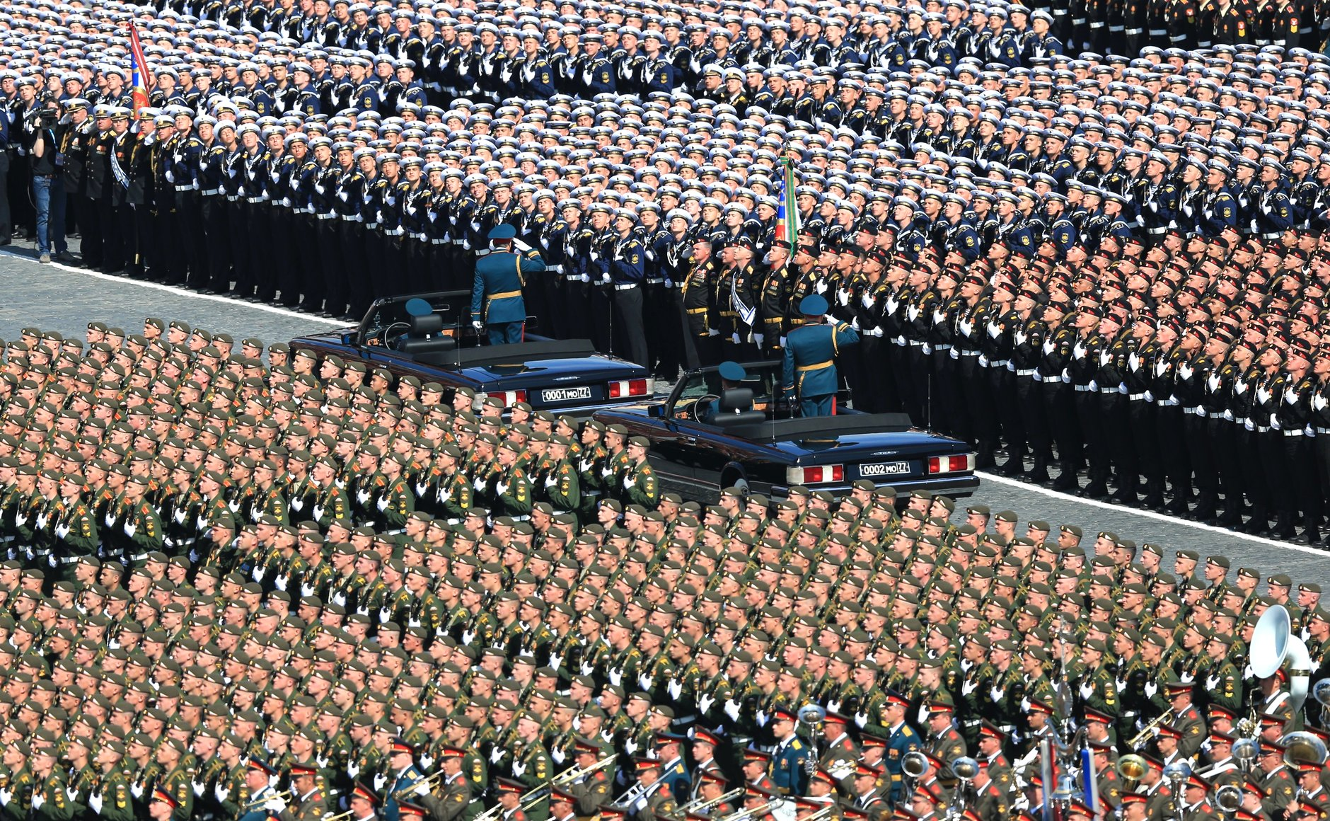 Министр обороны РФ, генерал армии Сергей Шойгу и командующий парадом Победы главнокомандующий Сухопутных войск РФ генерал-полковник Олег Салюков во время военного парада.